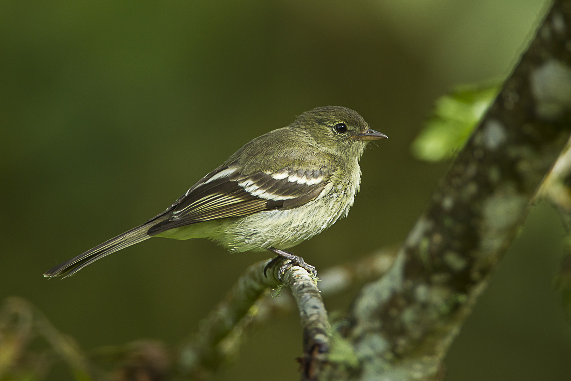 Mountain Elaenia - Colombia_S4E2481